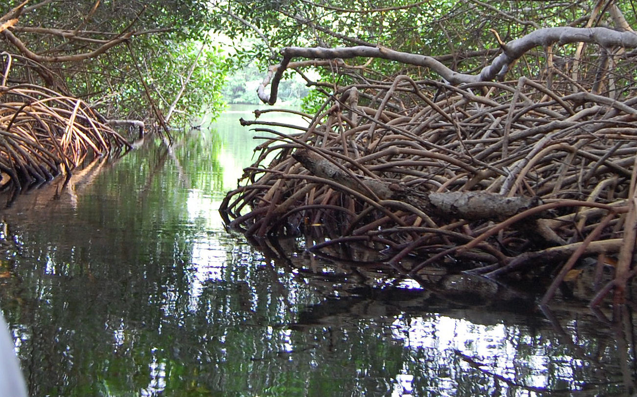 Manglar en Cartagena de Indias, colombia